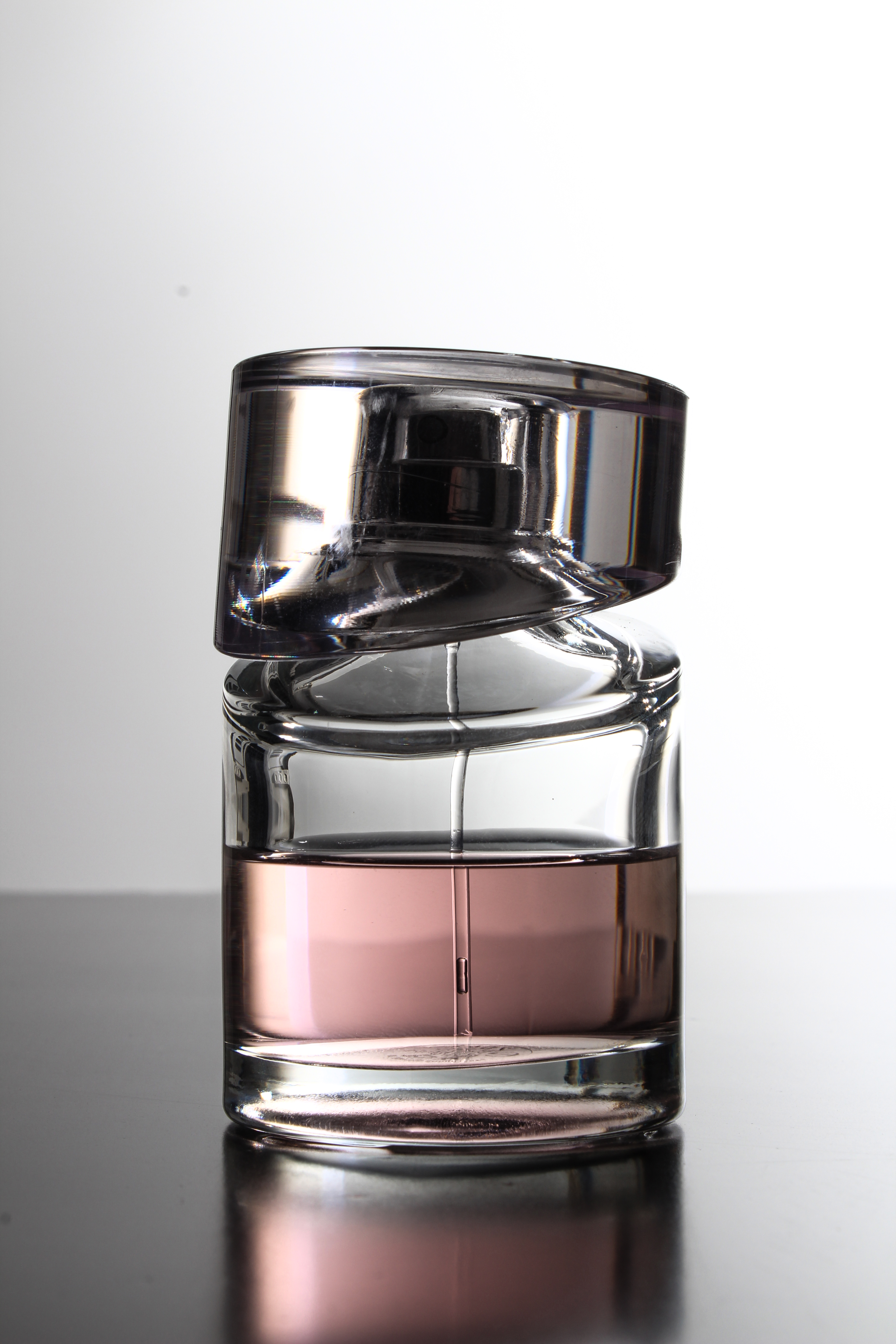 בושם שצולם על רקע לבן